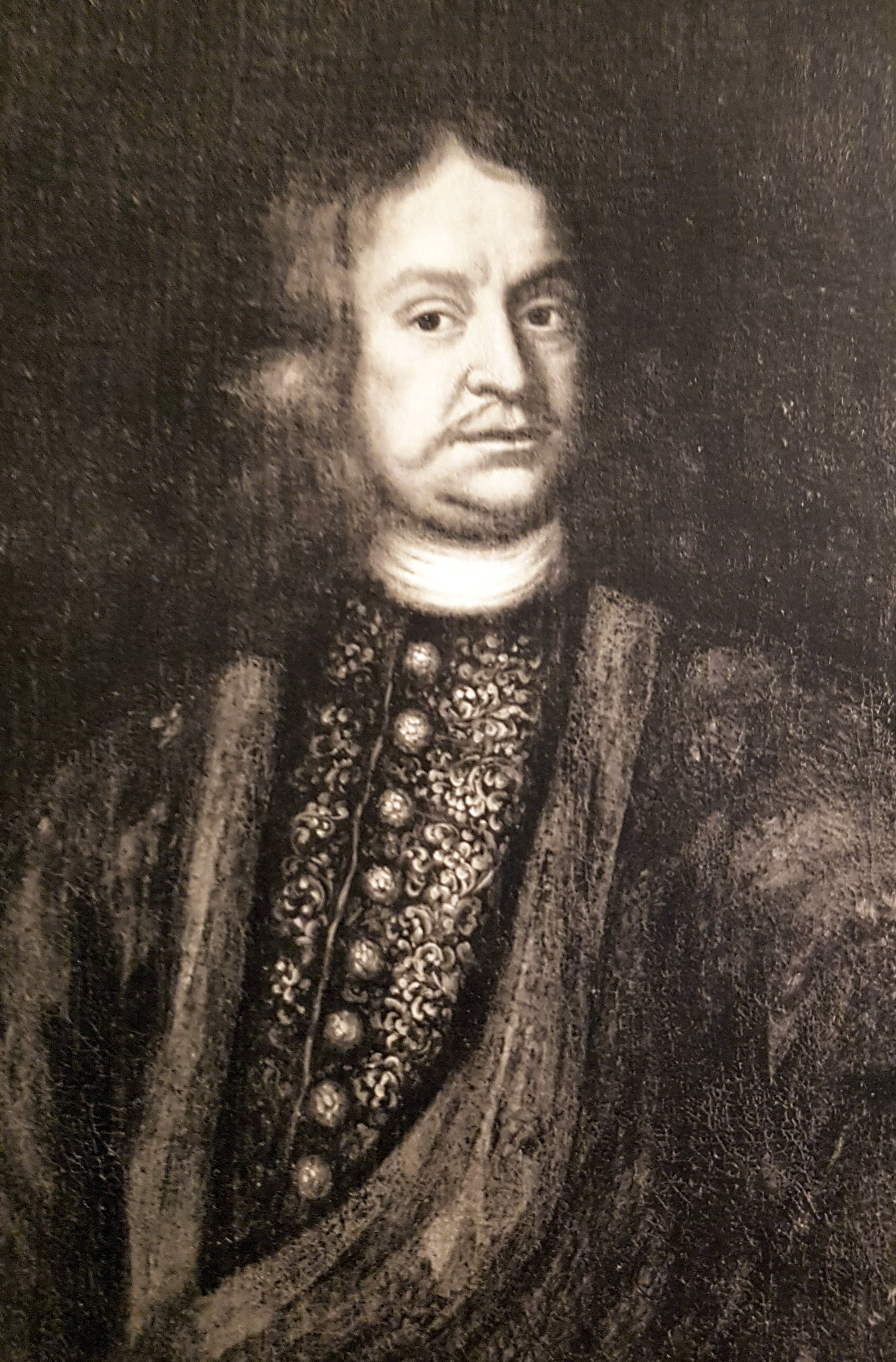 Porträtt av Isaac Cronström, målat av David Klöcker-Ehrenstrahl